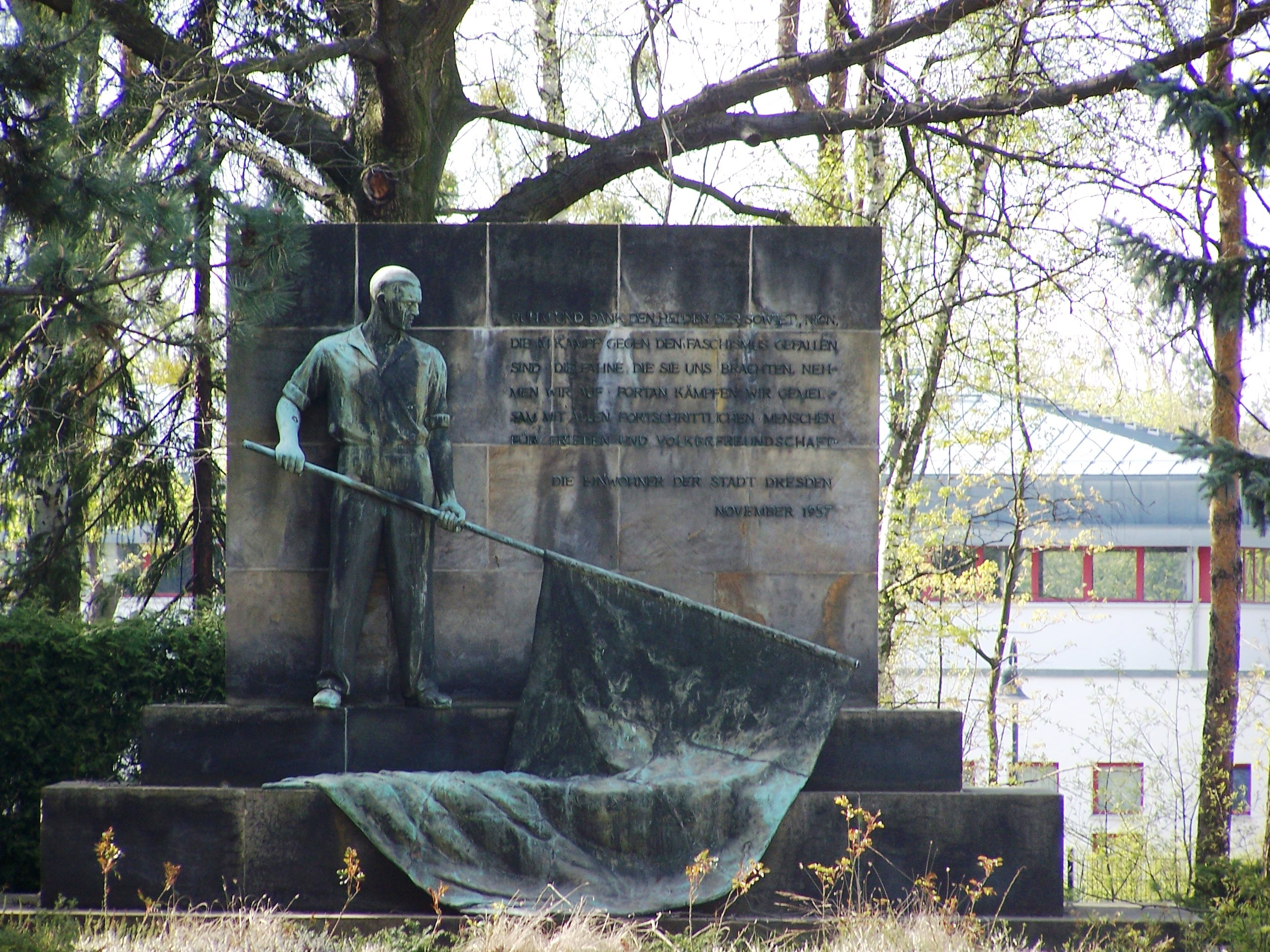 Sowjetischer Friedhof in der Dresdner Albertstadt